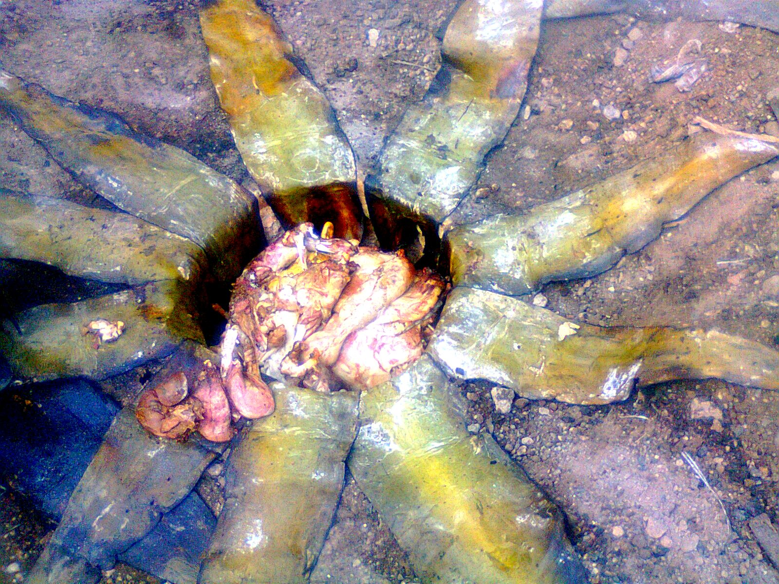 Barbacoa de Borrego en Horno de Suelo This photo has been taken in the country: Mexico